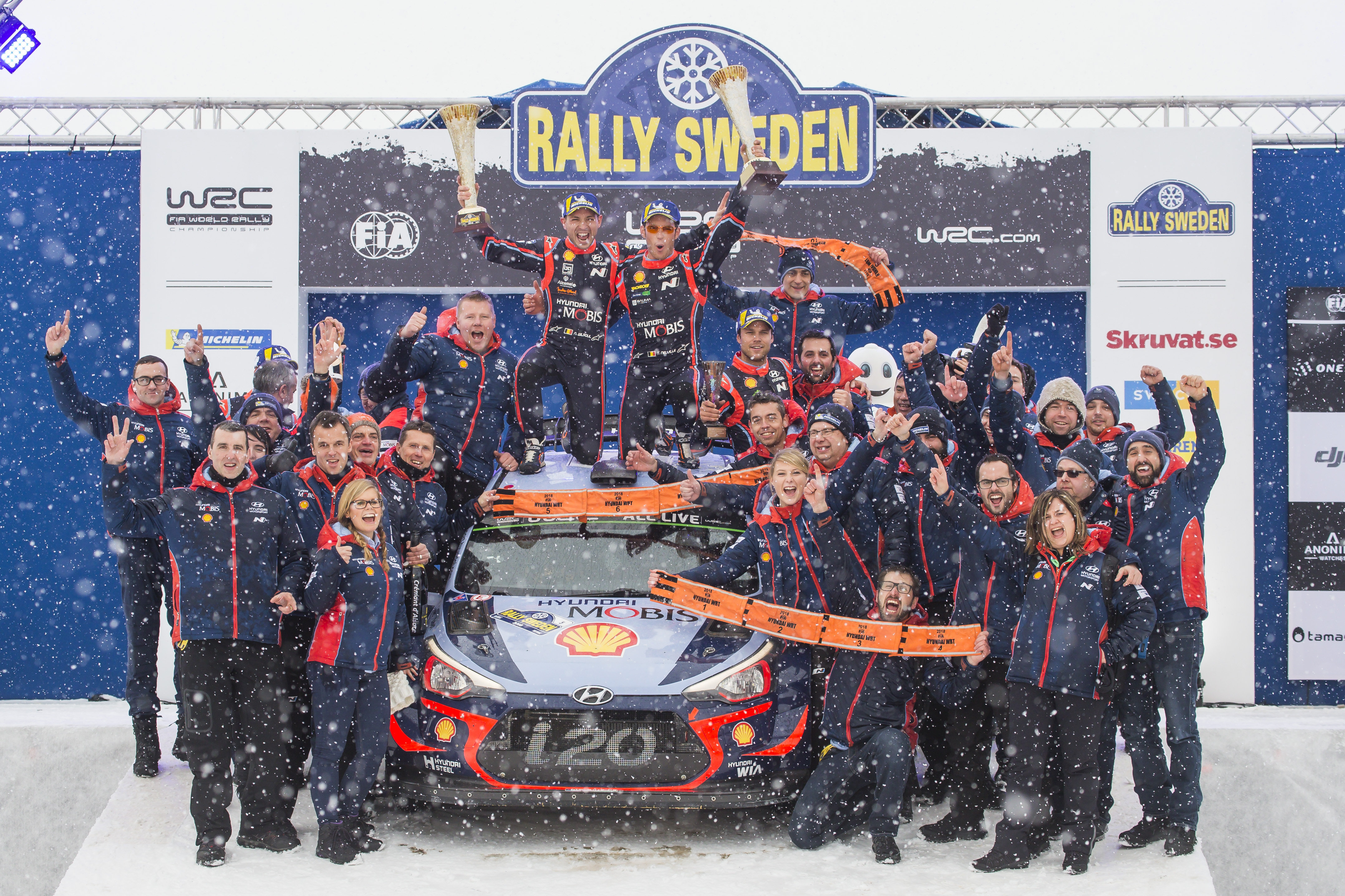 Zwycięzcy Rajdu Szwecji 2018 Thierry Neuville i Nicolas Gilsoul